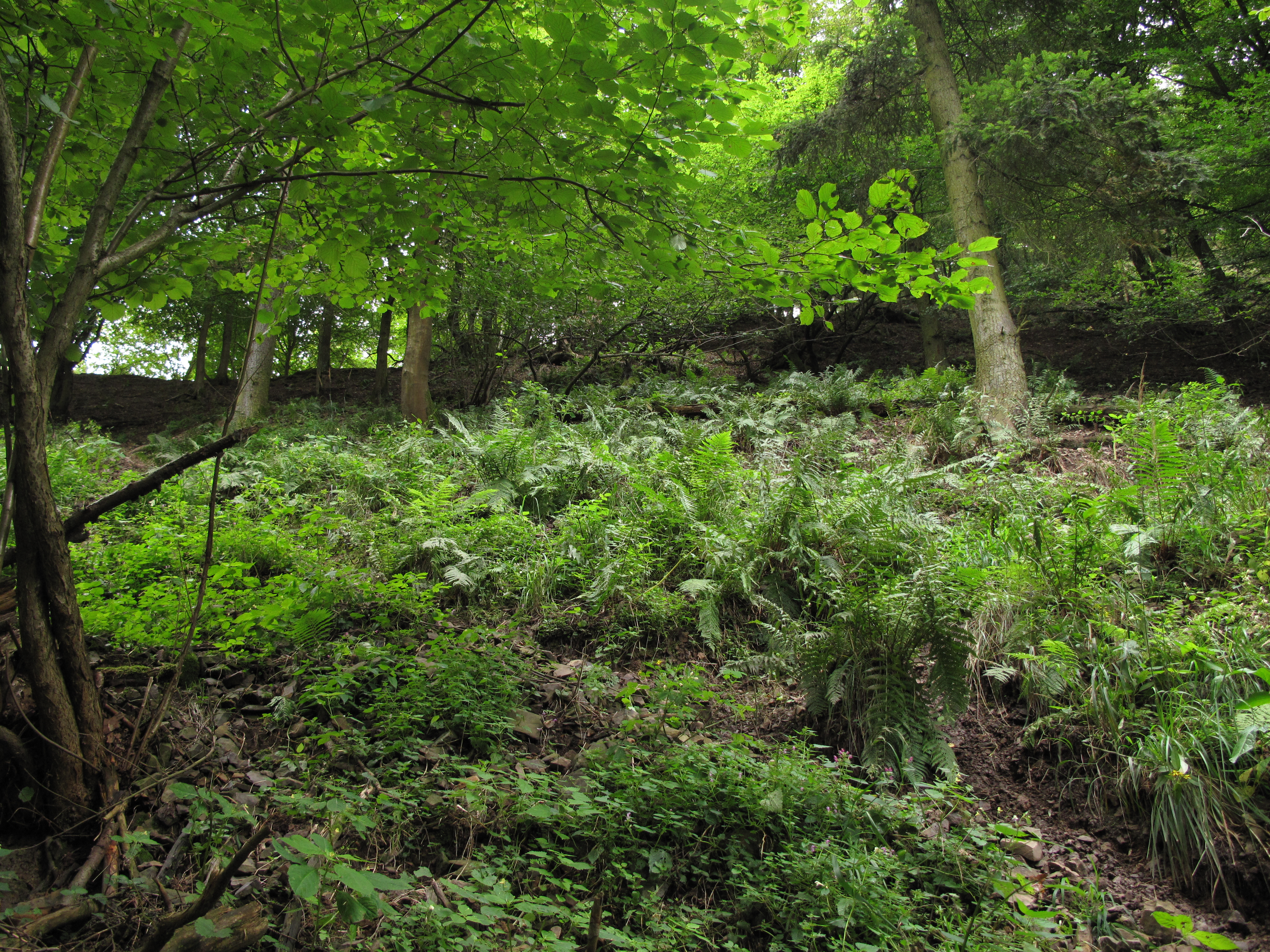 Kapradí v přírodní rezervaci Lípa. Okres Rokycany, Česká republika.